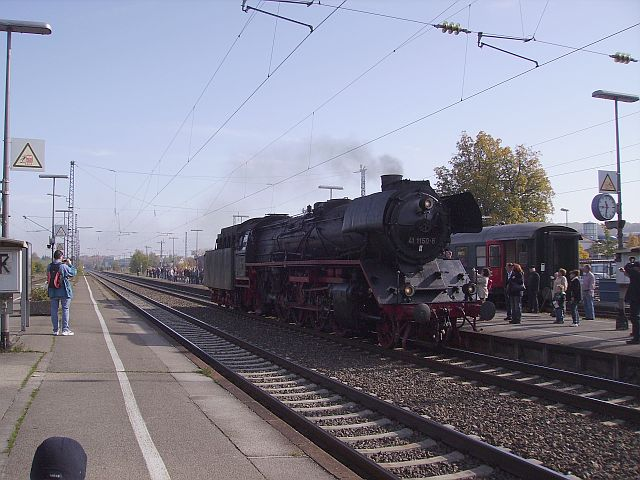 41 1150 vom Bw Nördlingen (des Bayerisches Eisenbahnmuseums) setzt in Gunzenhausen um.